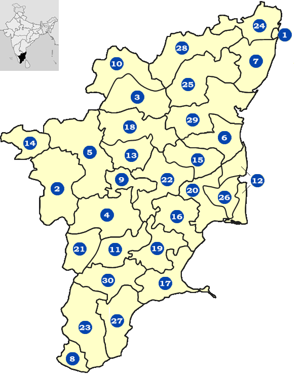 Distrikte in Tamil Nadu (Indien) alphabetische Sortierung auf Grundlage von Image:TN Districts Numbered.png, aber mit einigen Veränderungen: aktuelle Grenzziehung zwischen Karur (9) und Tiruchirapalli (22) alphabetische Sortierung erfolgt nach tamilischer Namensschreibweise (Ausnahme: Coimbatore, Erode), d.h. Cuddalore = Kadalur, Thanjavur = Tanjavur, Theni = Teni, Thoothukudi = Tuttukkudi Nilgiris an 14. Stelle (ohne englischen bestimmten Artikel) Eine entsprechend durchnummerierte Liste der Distrikte findet sich in der deutschen Wikipedia.